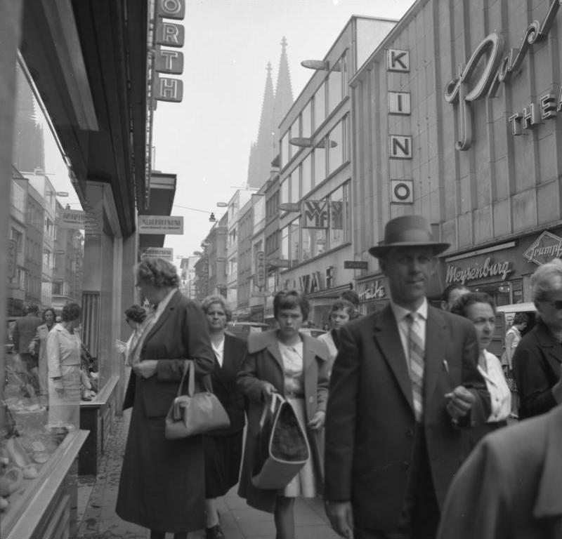 Stadtaufnahme Köln